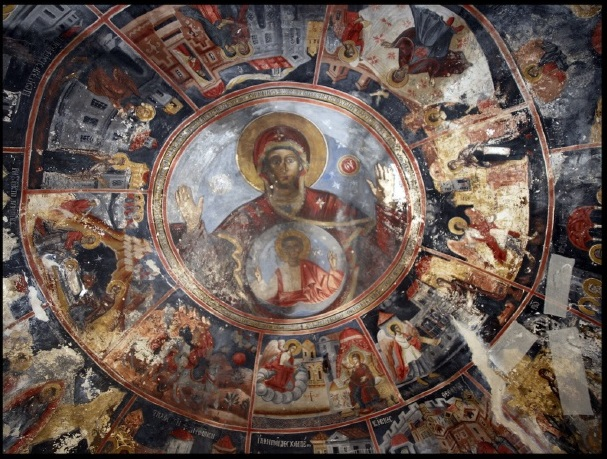 Стенопис от Жиковишкия манастир, Костурско, Гърция.